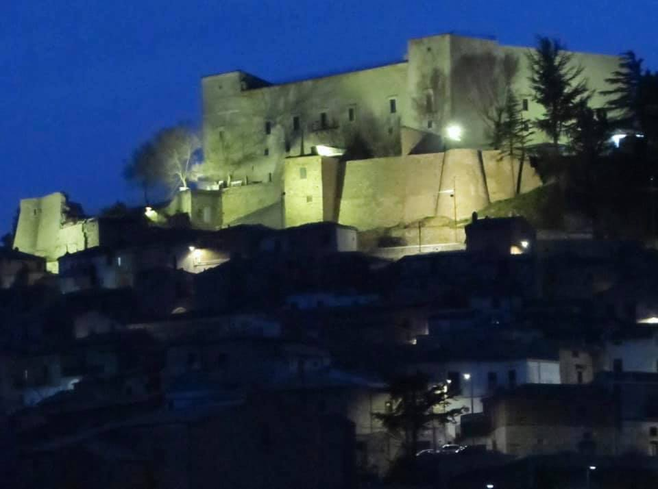 il castello imperiale